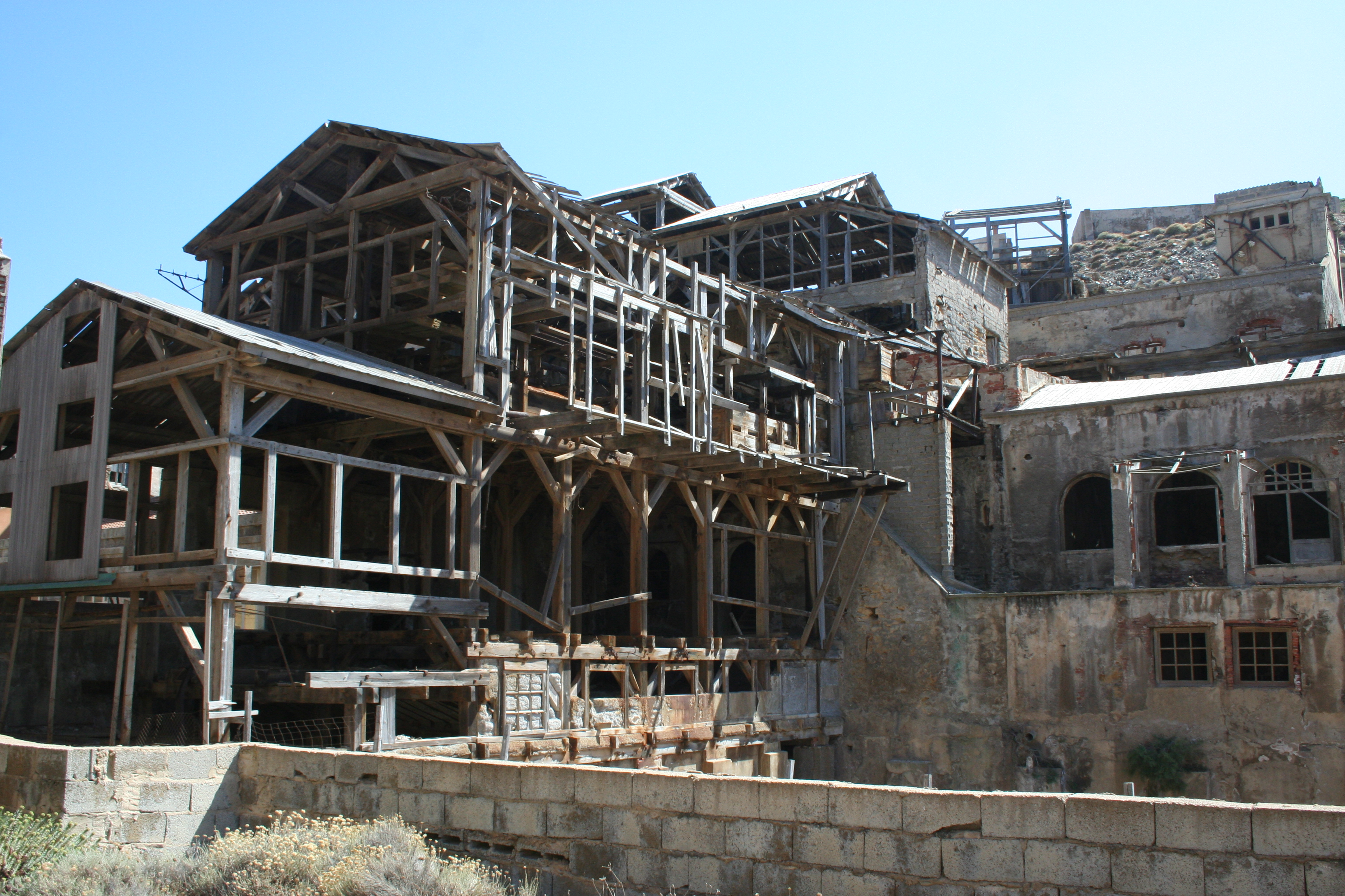 Strutture minerarie abbandonate - Argentiera (Sassari)